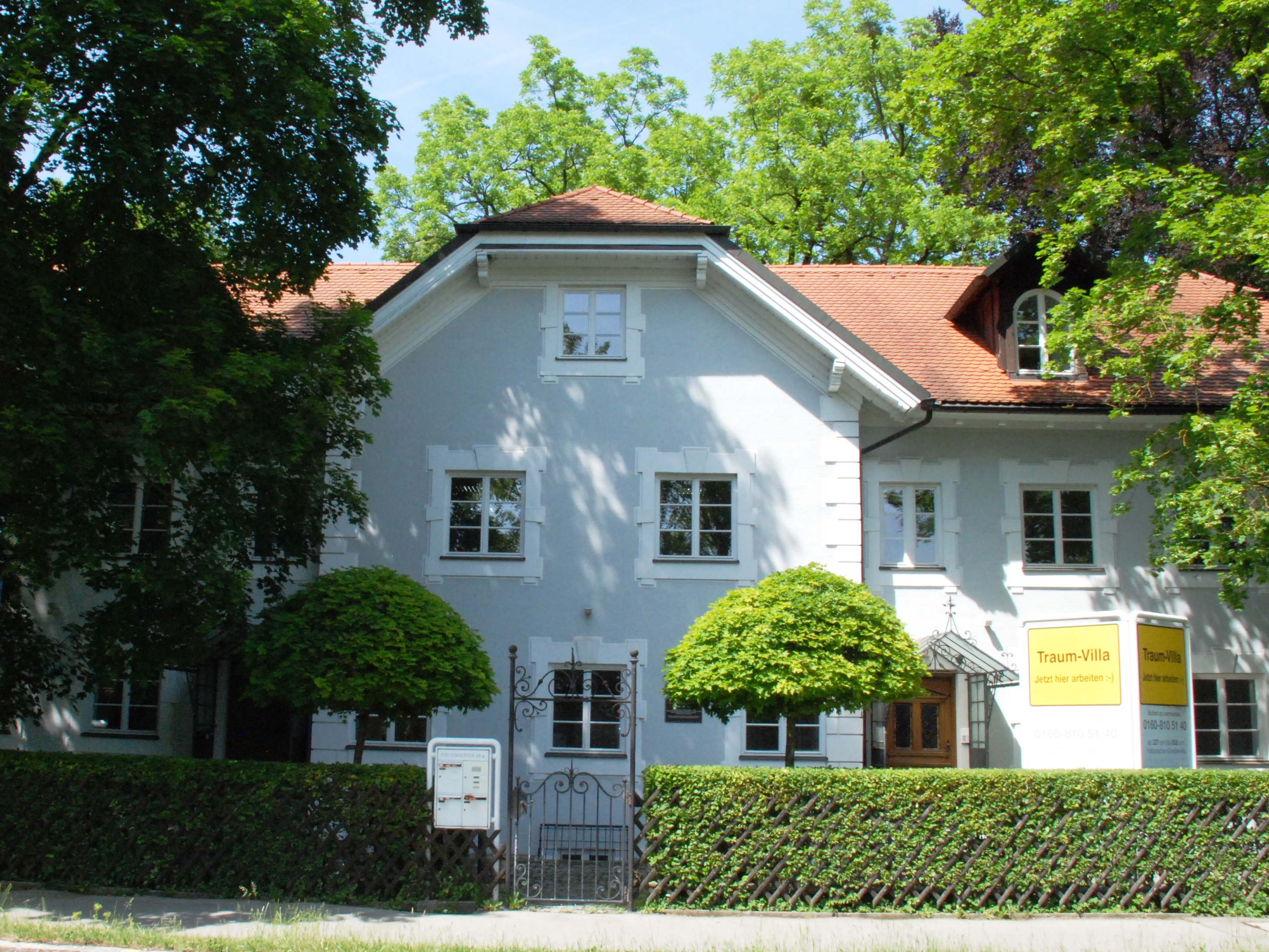 Denkmalgeschütztes ehemaliges Wohnhaus der Schriftsteller Waldemar Bonsels und Bernd Isemann in Oberschleißheim, Landkreis München. Errichtet durch Wladimir Swertschkoff.